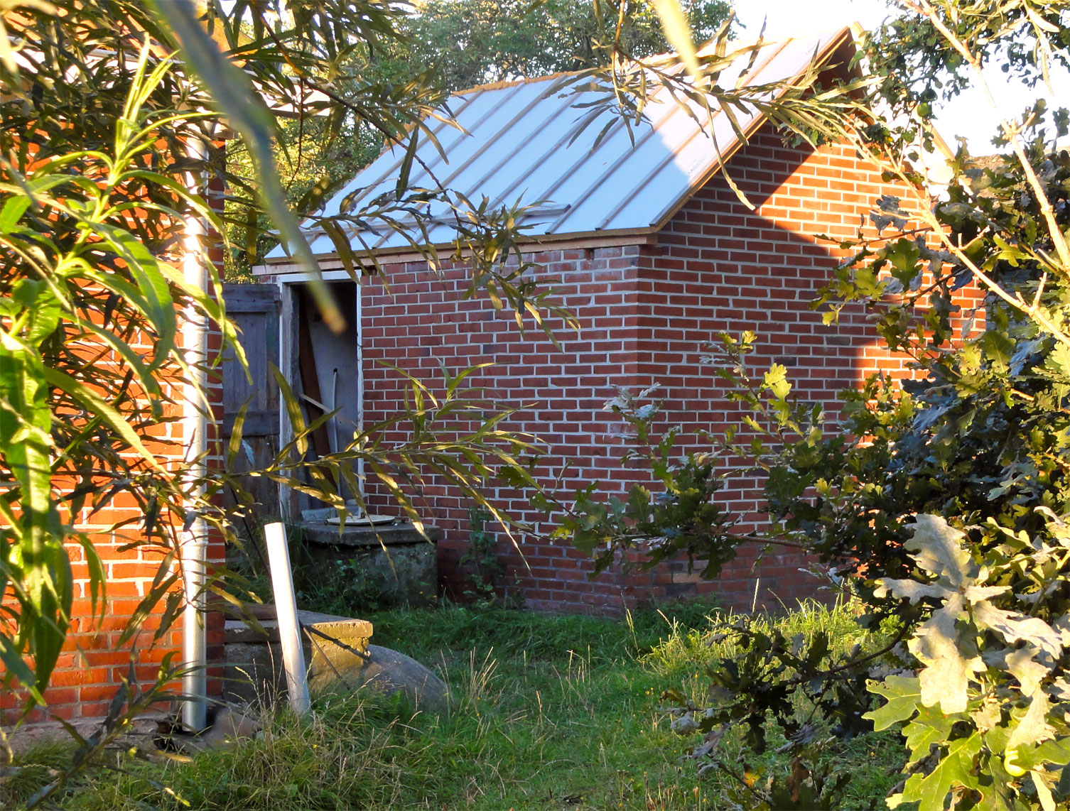 Hok bij arbeiderswoning aan de Mûntsegroppe 14 Harkema